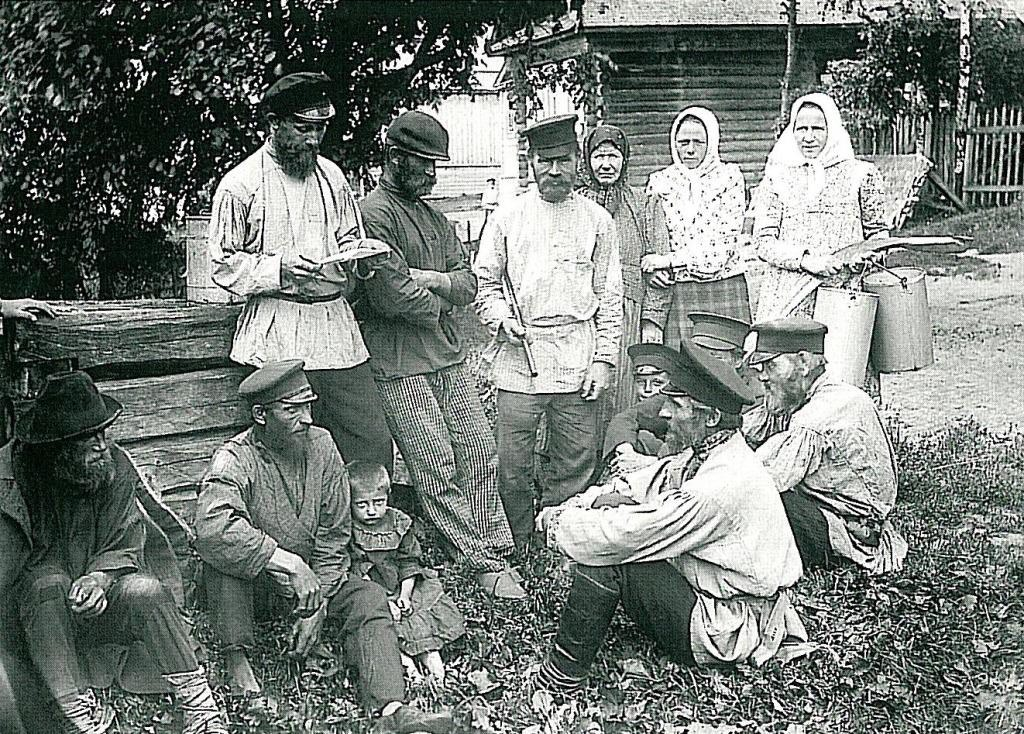 Чтение документа на крестьянской сходке. Владимирская губерния. Русские. М.А. Круковский. 1914 год.